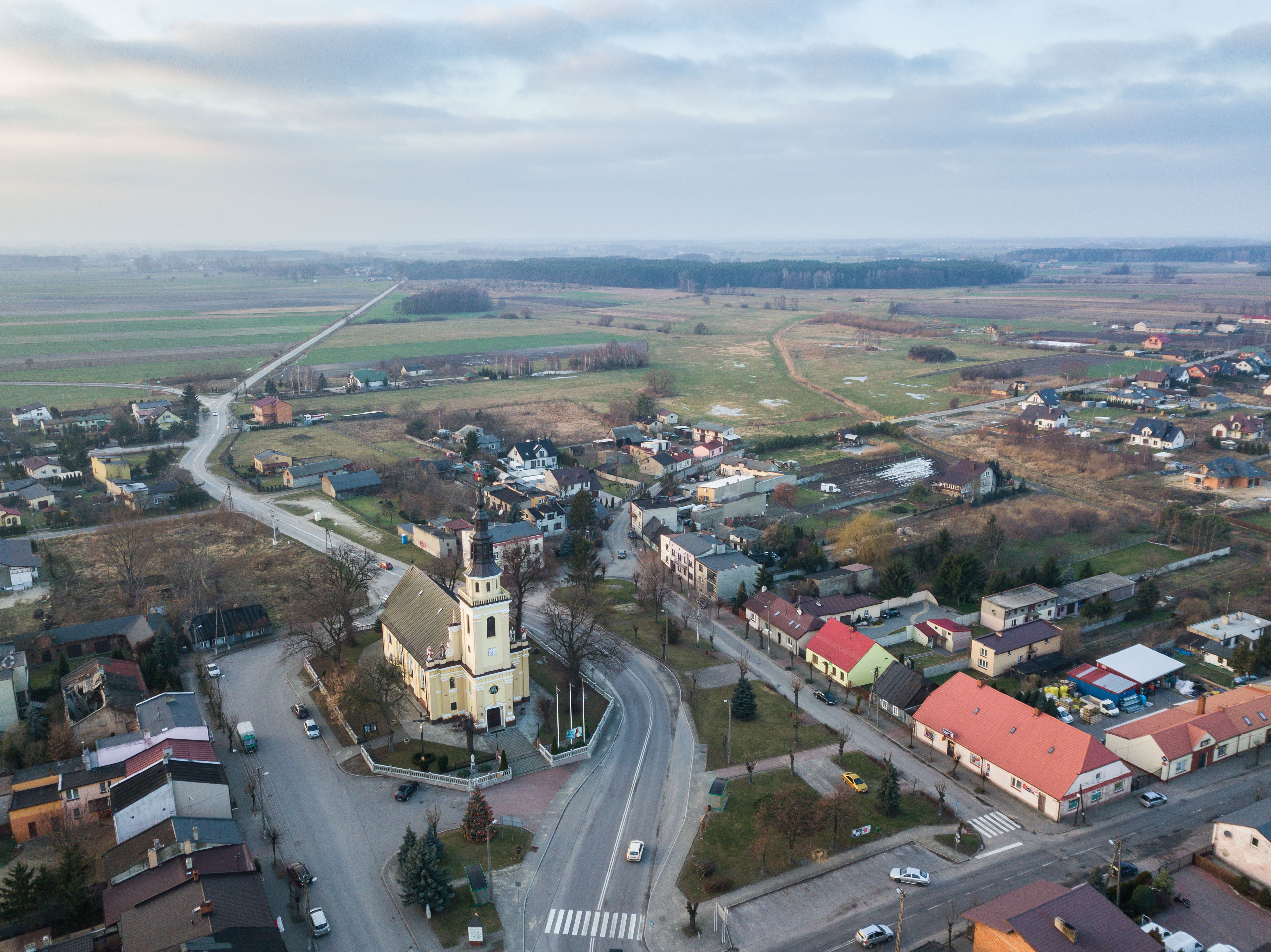 Widok na kościół w Parzęczewie od strony Ozorkowa.